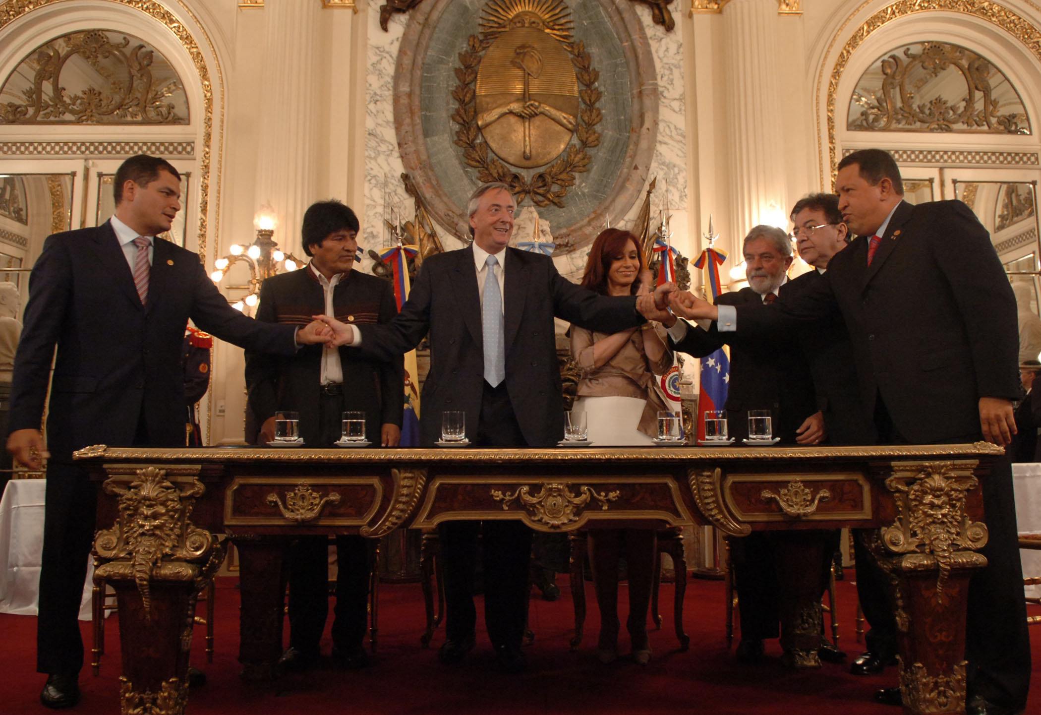 Presidentes de Ecuador (Rafael Correa), Presidente de Bolivia (Evo Morales), Presidente de Argentina y luego Secretario General de UNASUR (Néstor Kirchner), presidenta electa de Argentina (Cristina Fernández de Kirchner), Presidente de Brasil (Luiz Inácio Lula da Silva), Presidente de Paraguay (Nicanor Duarte Frutos) y Presidente de Venezuela (Hugo Chávez), firman el Acta Fundacional del Banco del Sur.